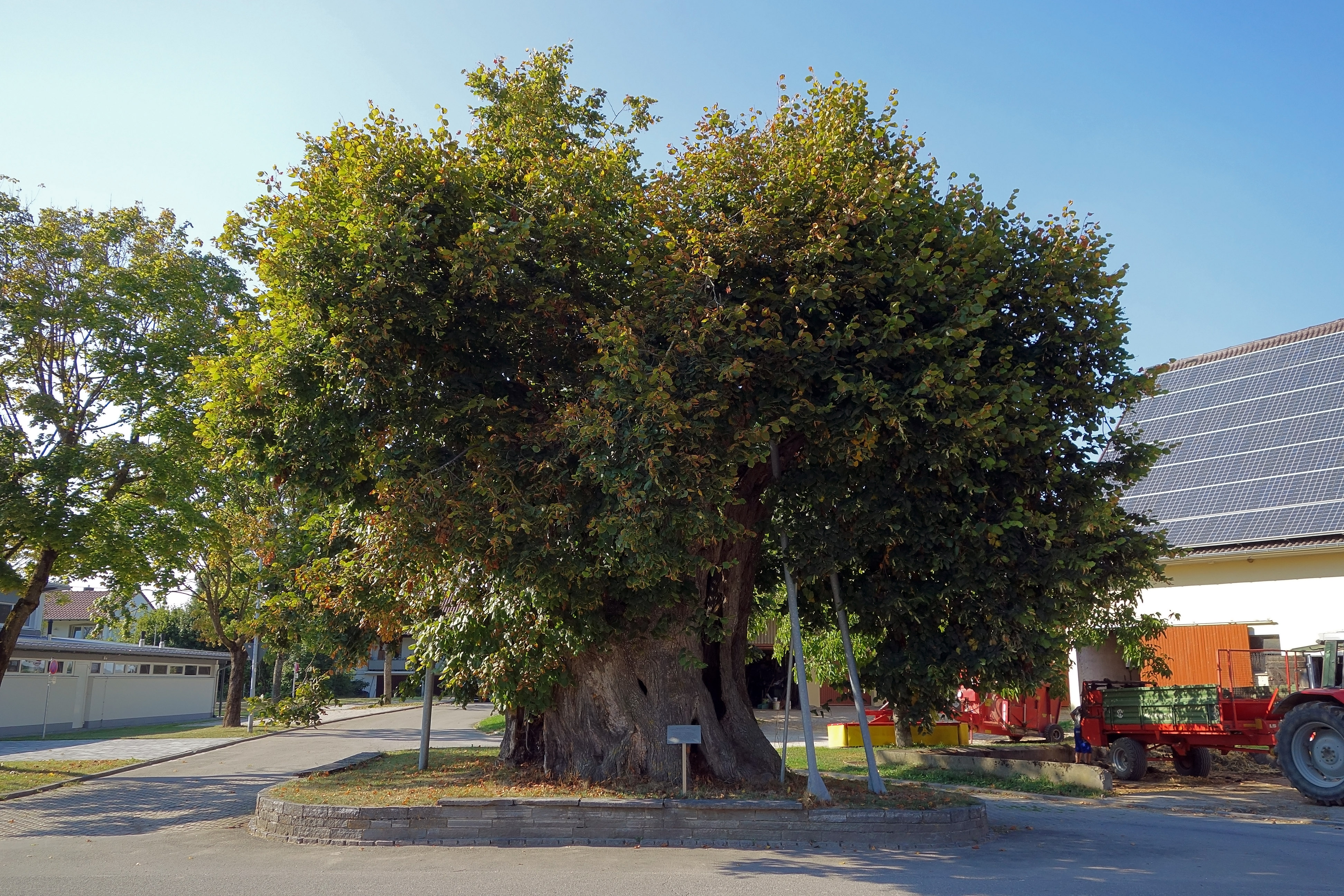 Linde Hohenbodman